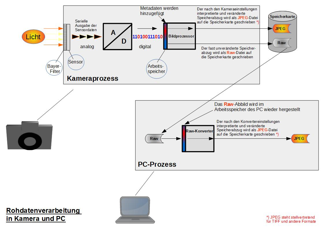 Prinzipielle Darstellung der Rohdatenverarbeitung in einer Digitalkamera sowie mittels Raw-Konverter im PC